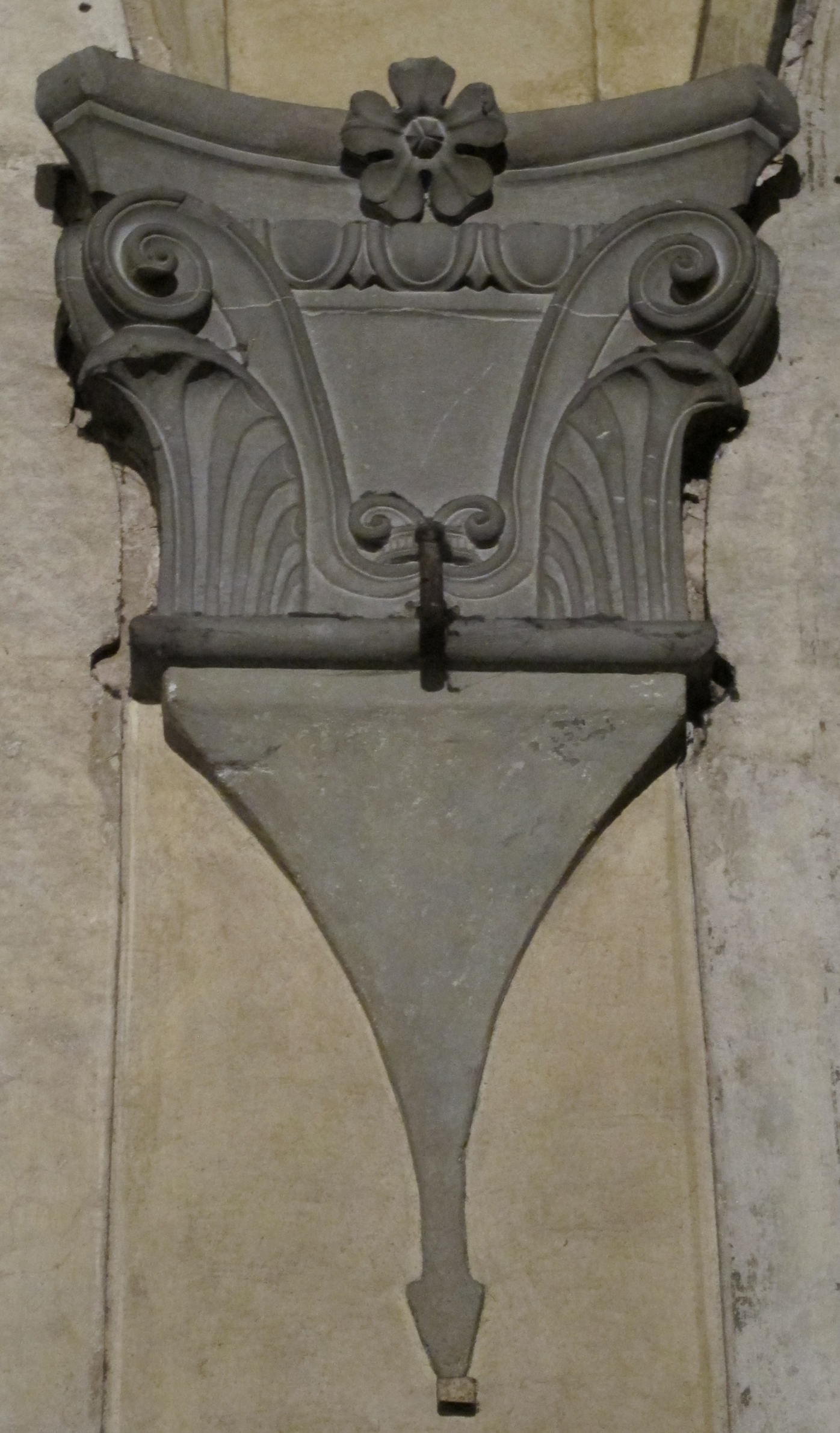 Chiostro dei voti, peduccio